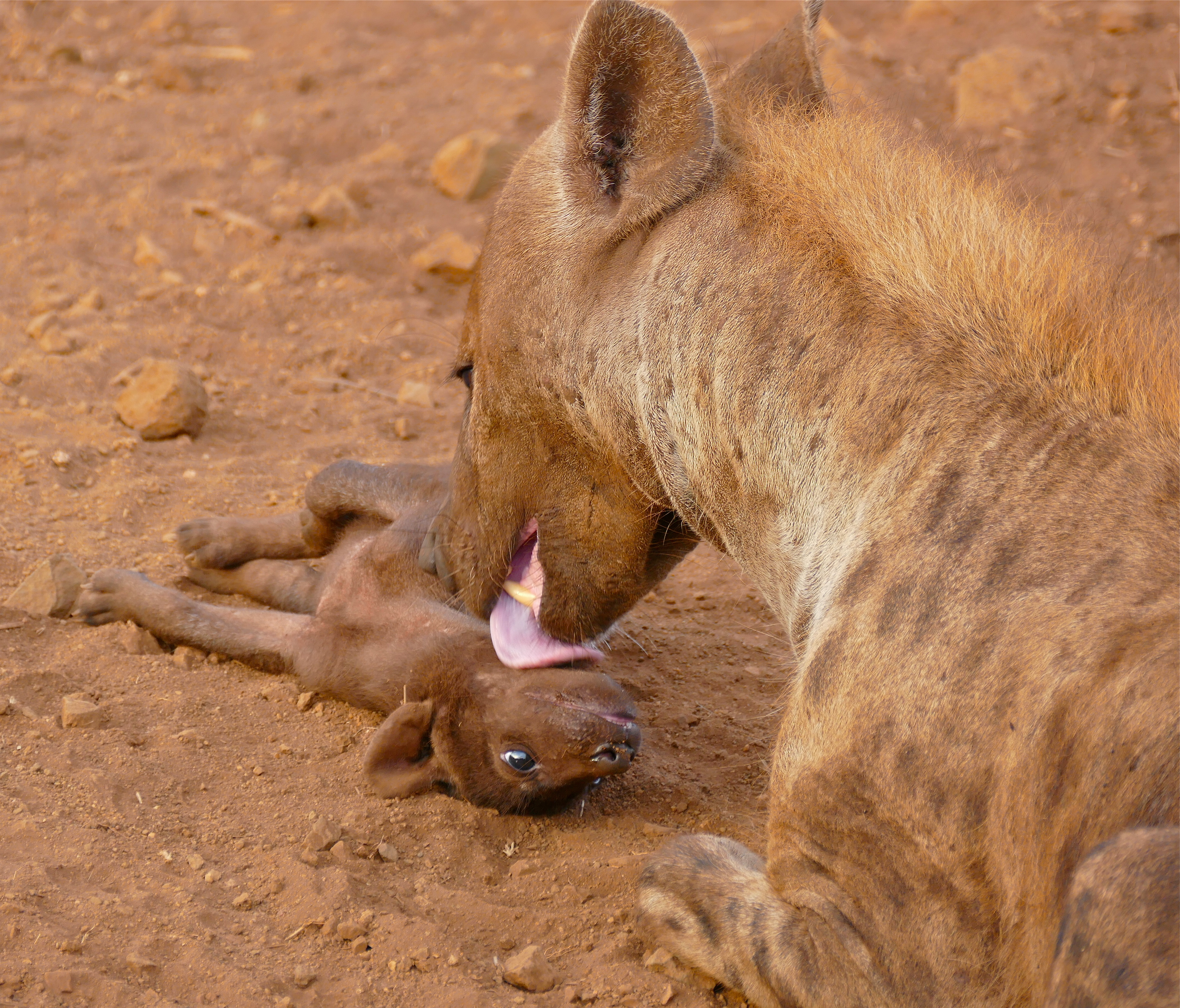 H6 Road East of Satara, Kruger NP, Mpumalanga, SOUTH AFRICA